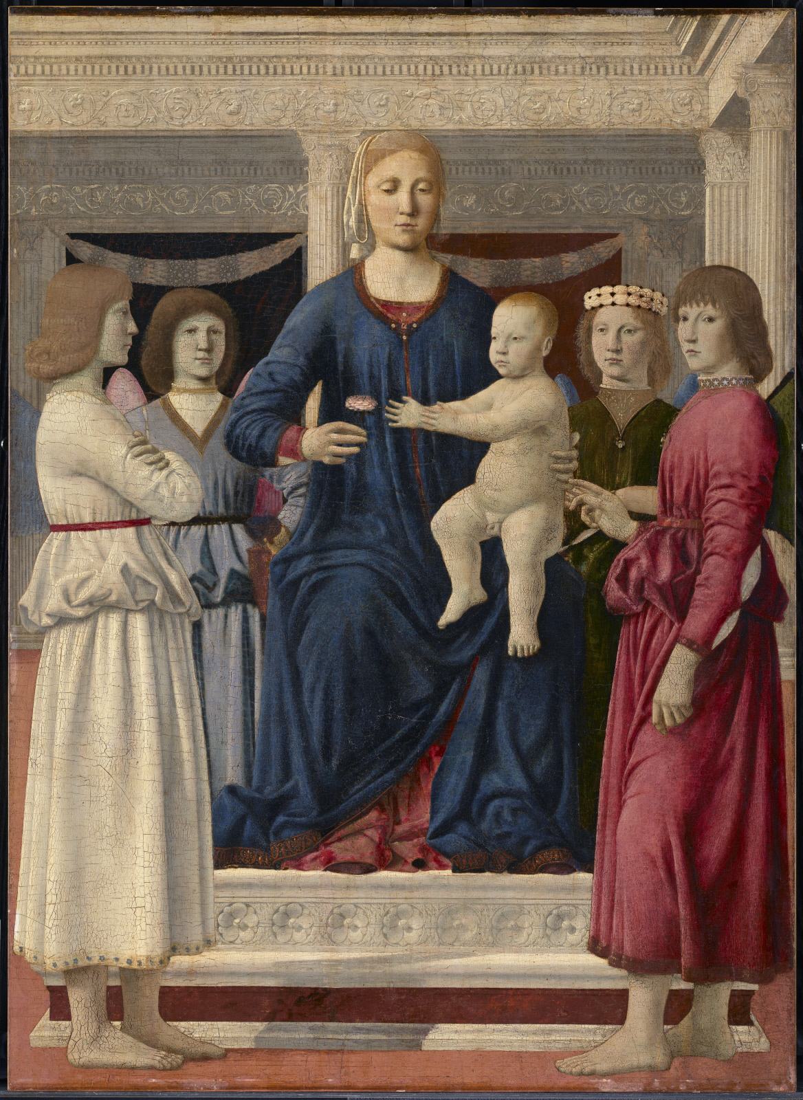 Piero, madonna col bambino e 4 angeli, clark art institute